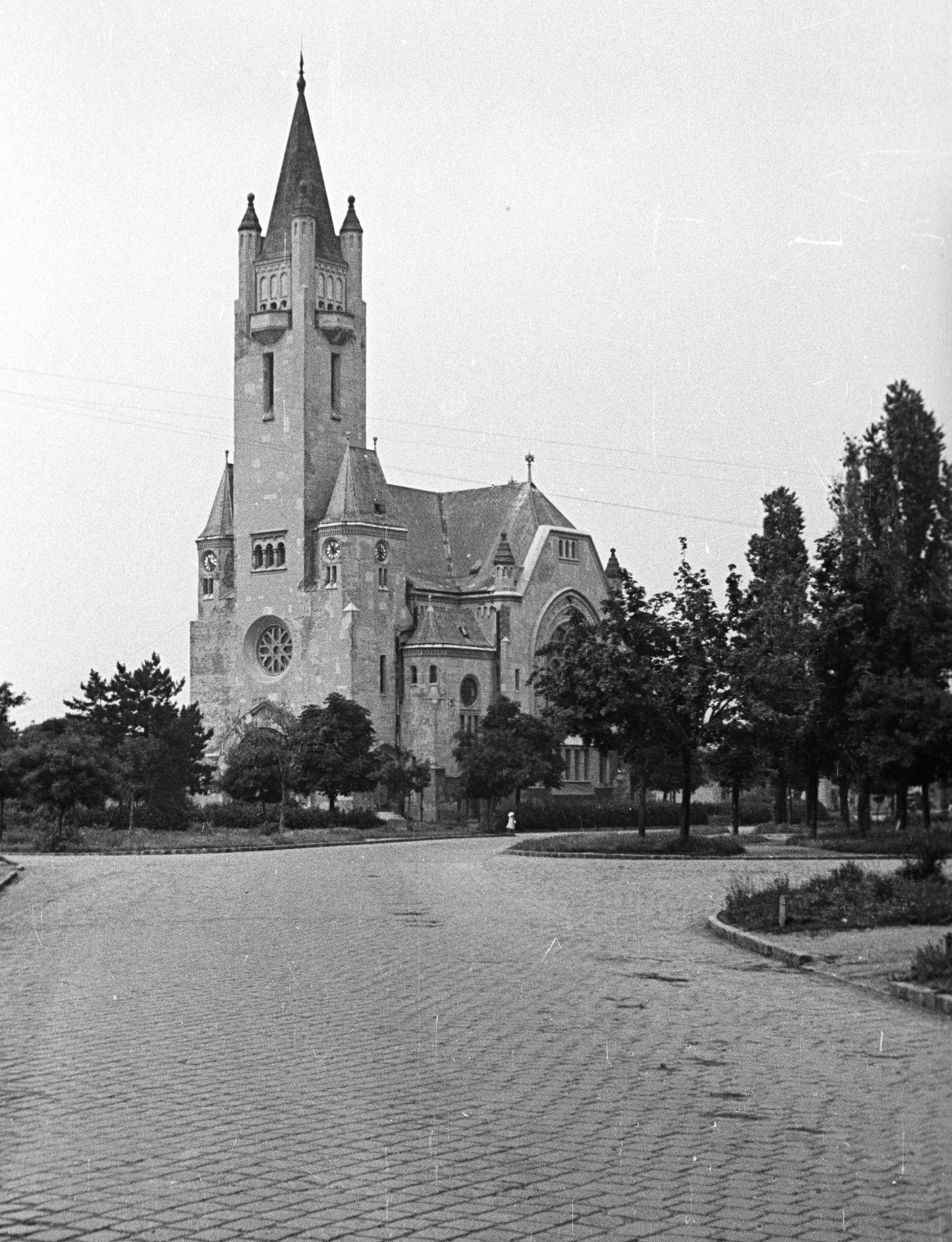 Árpád tér, református templom. Location: Hungary, Debrecen Tags: church Title: Árpád tér, református templom.